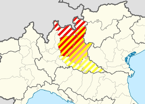 Orobia / Lombardia orientale. In rosso i territori alpini e prealpini orobici, in giallo l'area della Lombardia storicamente soggetta all'influenza della Repubblica di Venezia.